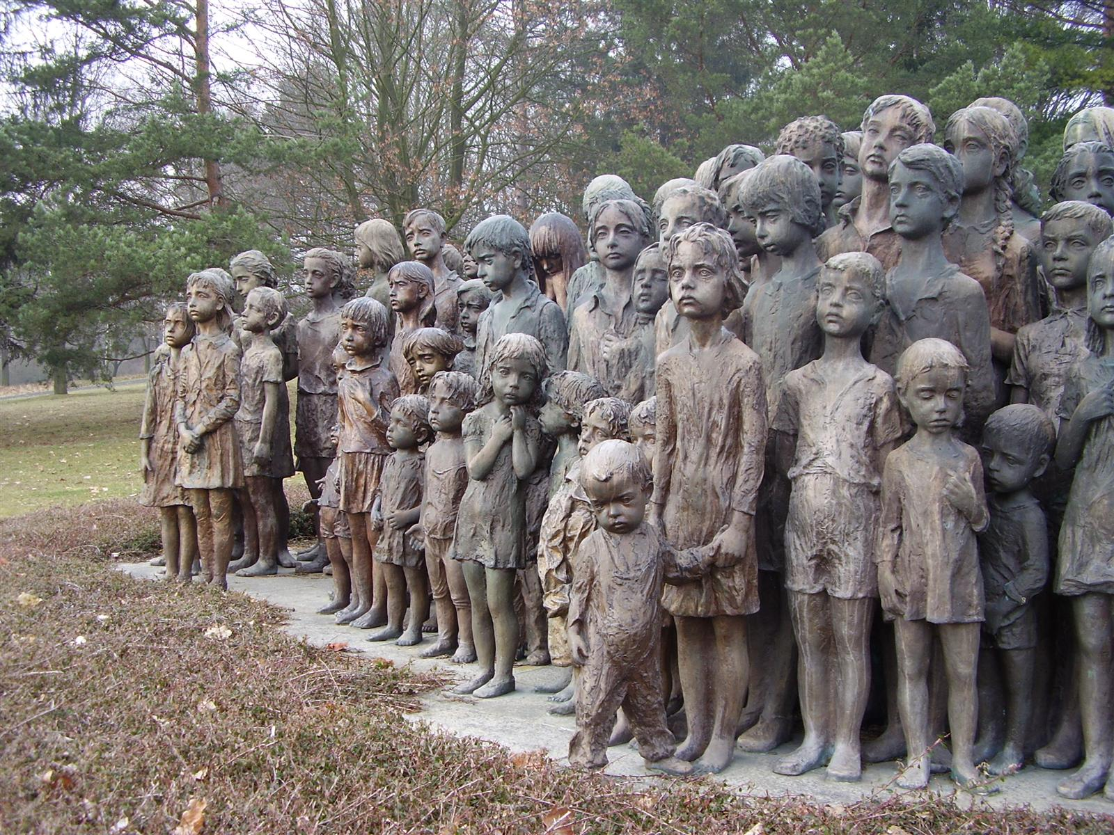 Sousoší připomínající dětské oběti 2. sv. války